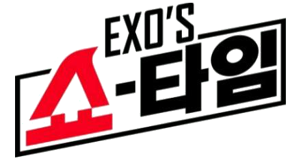 Logo del programa de Exo «Exo's 쇼타임»